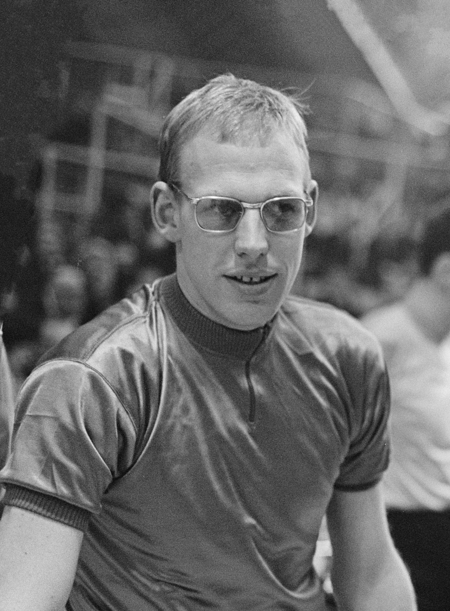 Zesdaagse in de RAI. Piet van der Lans (Ned)